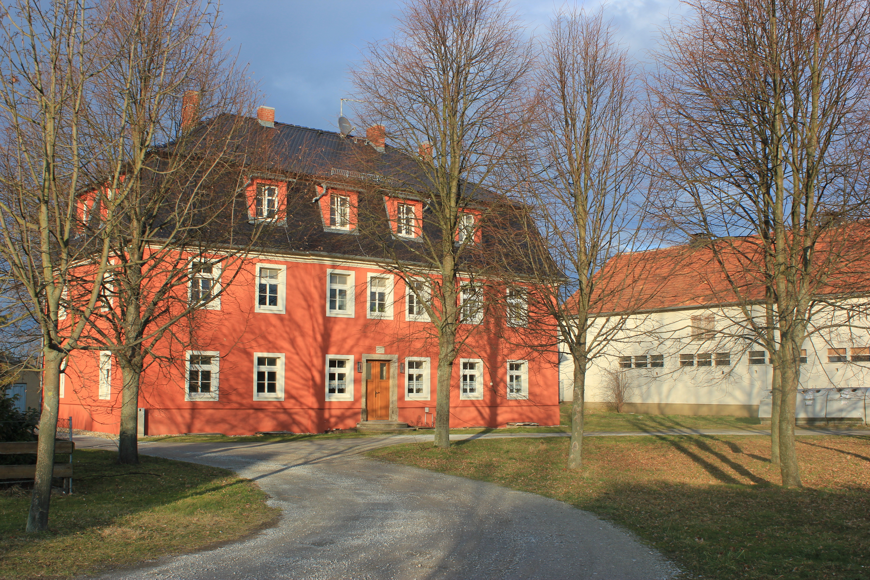 Hornjoserbsce: Něhdyše ryćerkubło w Chasowje.